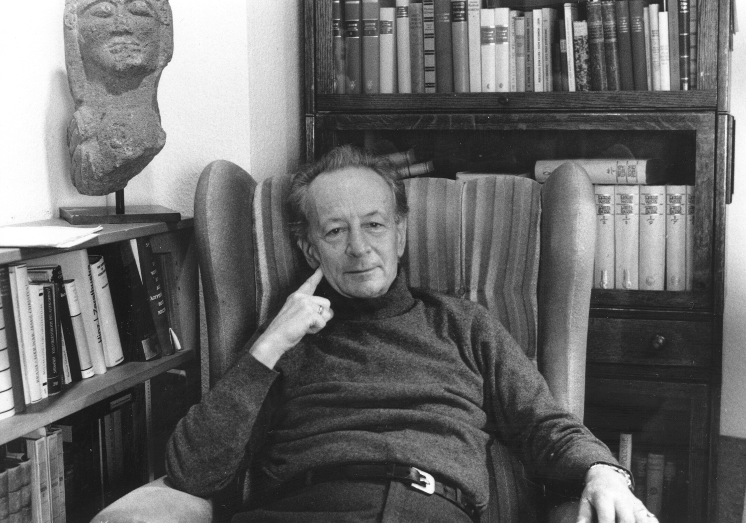 Dieter Wyss (* 21. Dezember 1923 in Addis Abeba; † 6. Juli 1994 San Carlos, Ibiza) war ein deutscher Psychiater, Psychotherapeut und Ordinarius für Medizinische Psychologie und Psychotherapie an der Julius-Maximilians-Universität Würzburg.